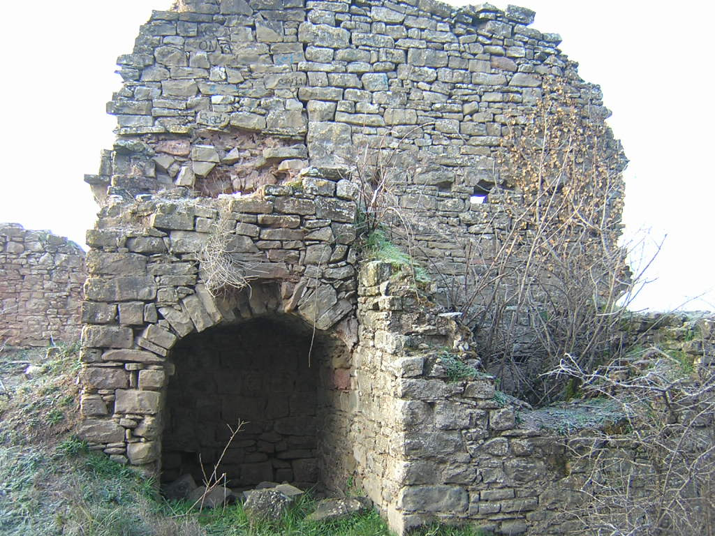 La Casanova (Monistrol de Calders, Moianès)